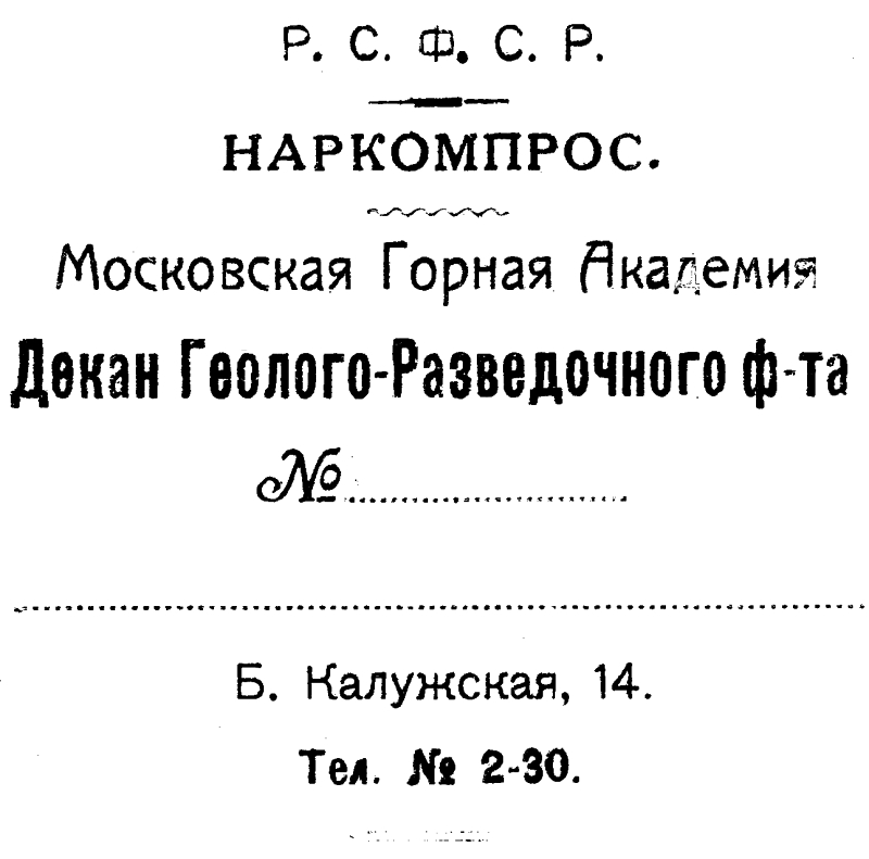 Московская горная академия